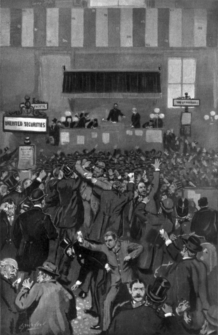 Паника на Нью-Йоркской фондовой бирже 5 мая 1893 года (рисунок из Frank Leslie's Illustrated Newspaper, 18.05.1893, стр. 322; обрезано).